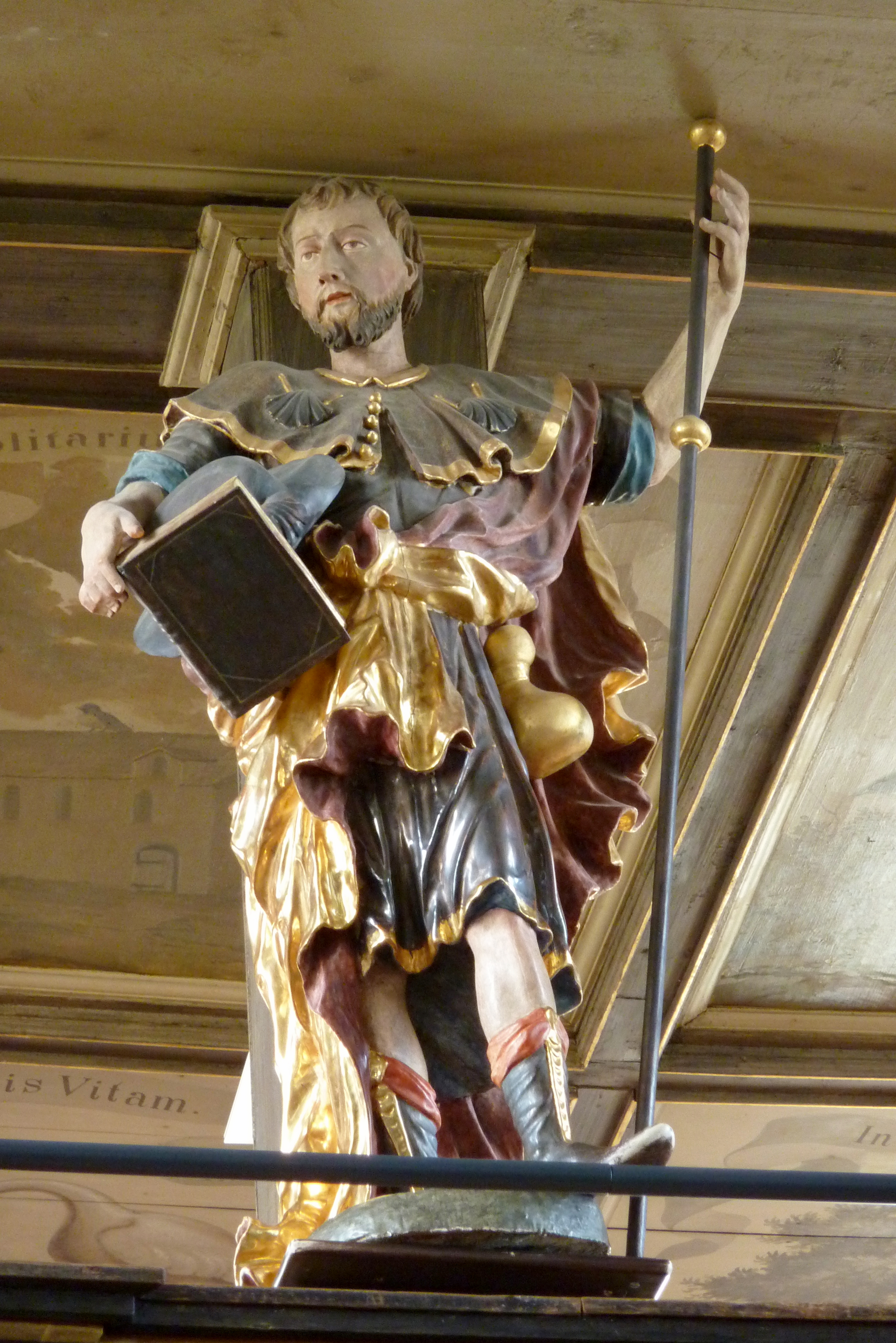 Katholische Pfarr- und Wallfahrtskirche St. Jakobus und Laurentius in Biberbach im Landkreis Augsburg (Bayern), Skulptur des Apostels Jakobus des Älteren, an der Empore, um 1690/95, wohl von Bartholomäus Eberl